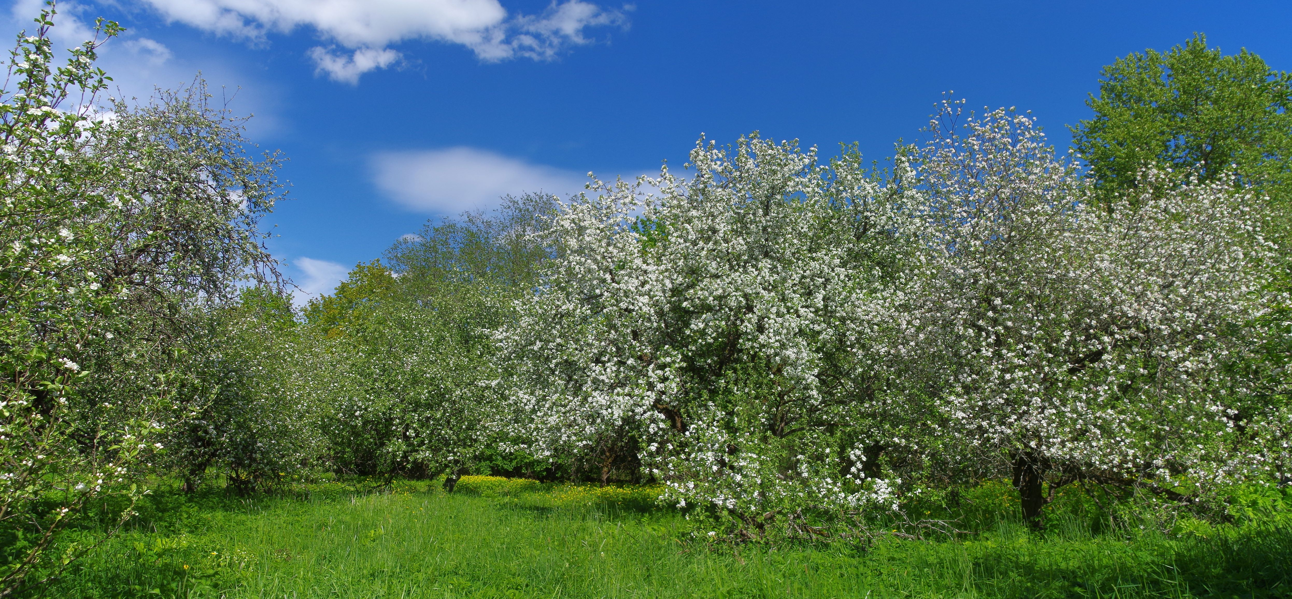 J.Raeda selektsiooniaed